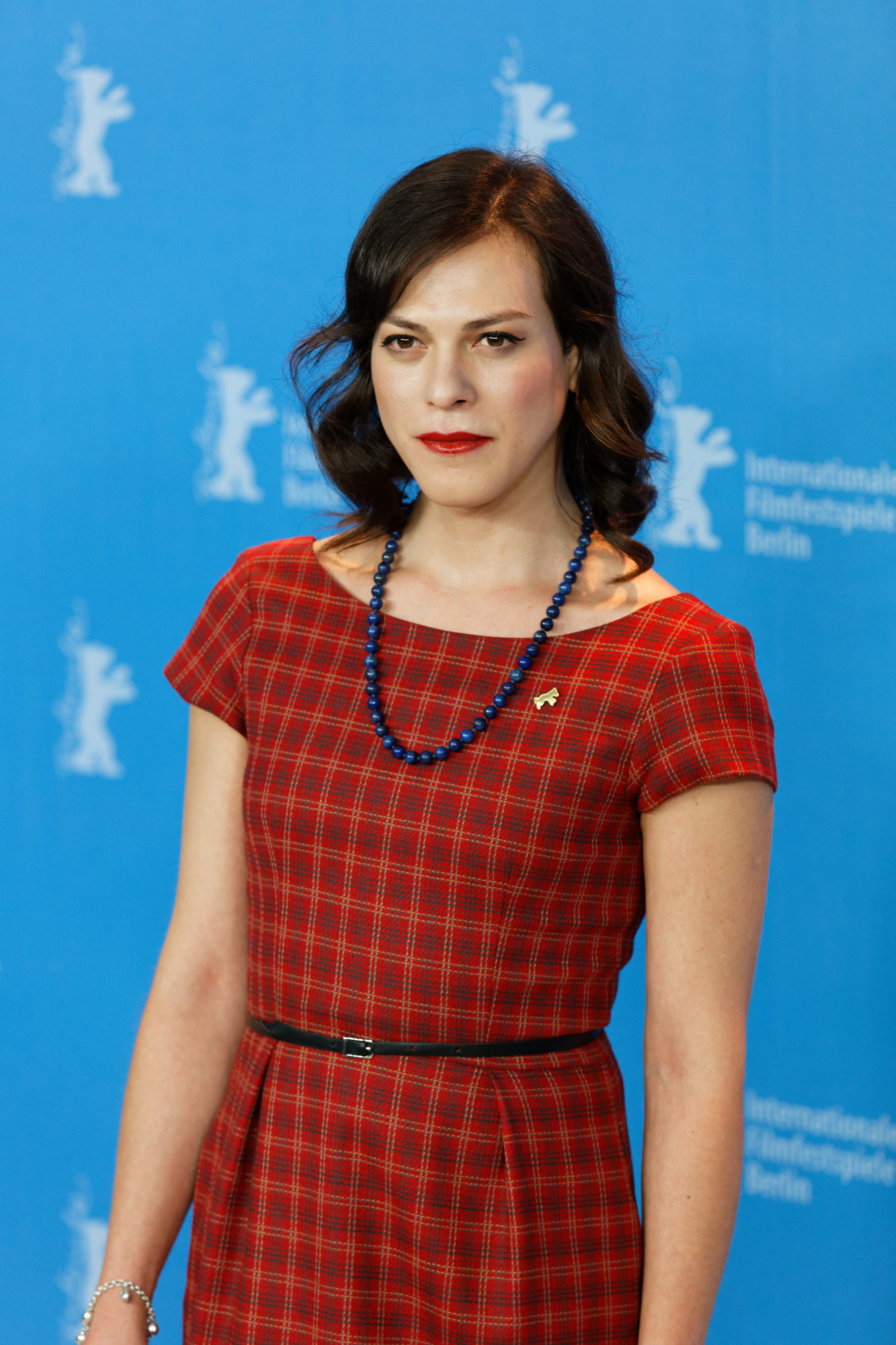 Daniela Vega beim Photo Call zu A Fantastic Woman bei der Berlinale 2017